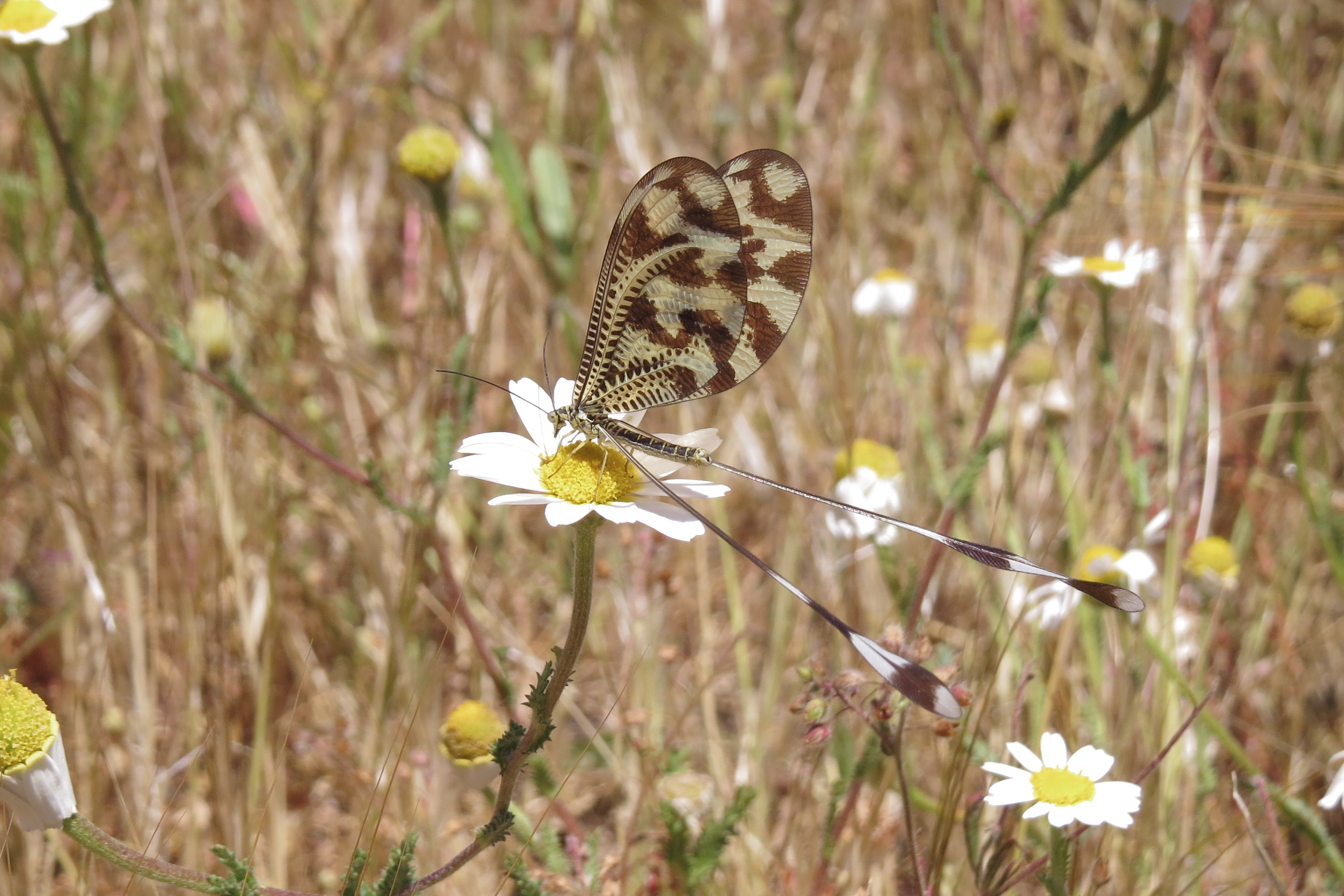 Nemoptera bipennins (Español Duende)